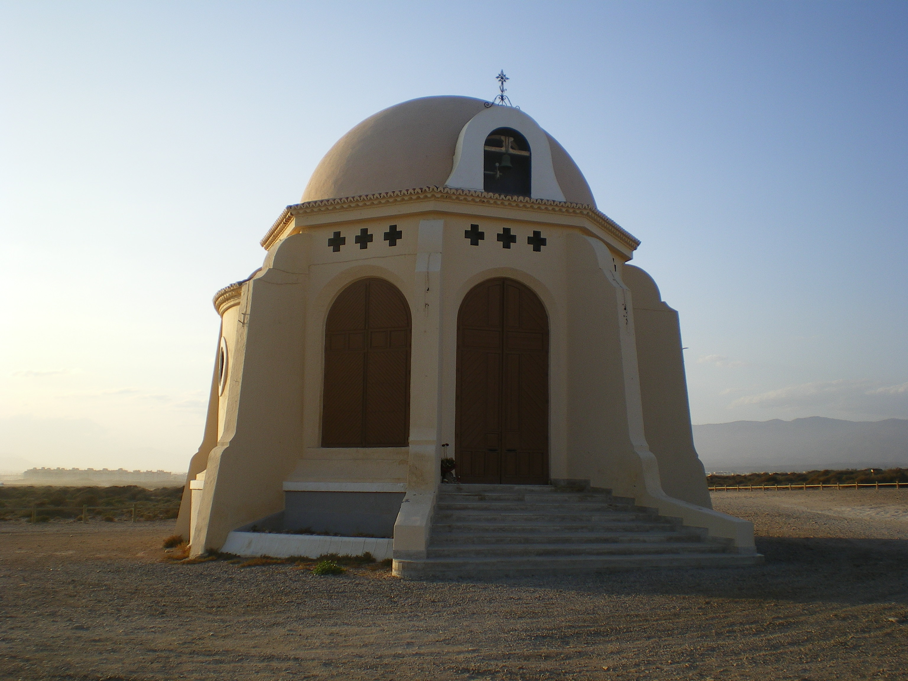 Fotografía de la Ermita de Torregarcía, dedicada a la Virgen del Mar, patrona de Almería, España.